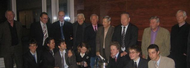 Photo de l'équipe Tous au Stade avec les invités d'honneurs à Reims Management School le 4 avril 2006. debout de gauche à droite: Jean-Claude Blanchard, le président Jean-Pierre Caillot, Lucien Muller, Dominique Colonna, Michel Hidalgo, Raymond Kopa, Just Fontaine, Claude Prosdocimi et Armand Penverne.